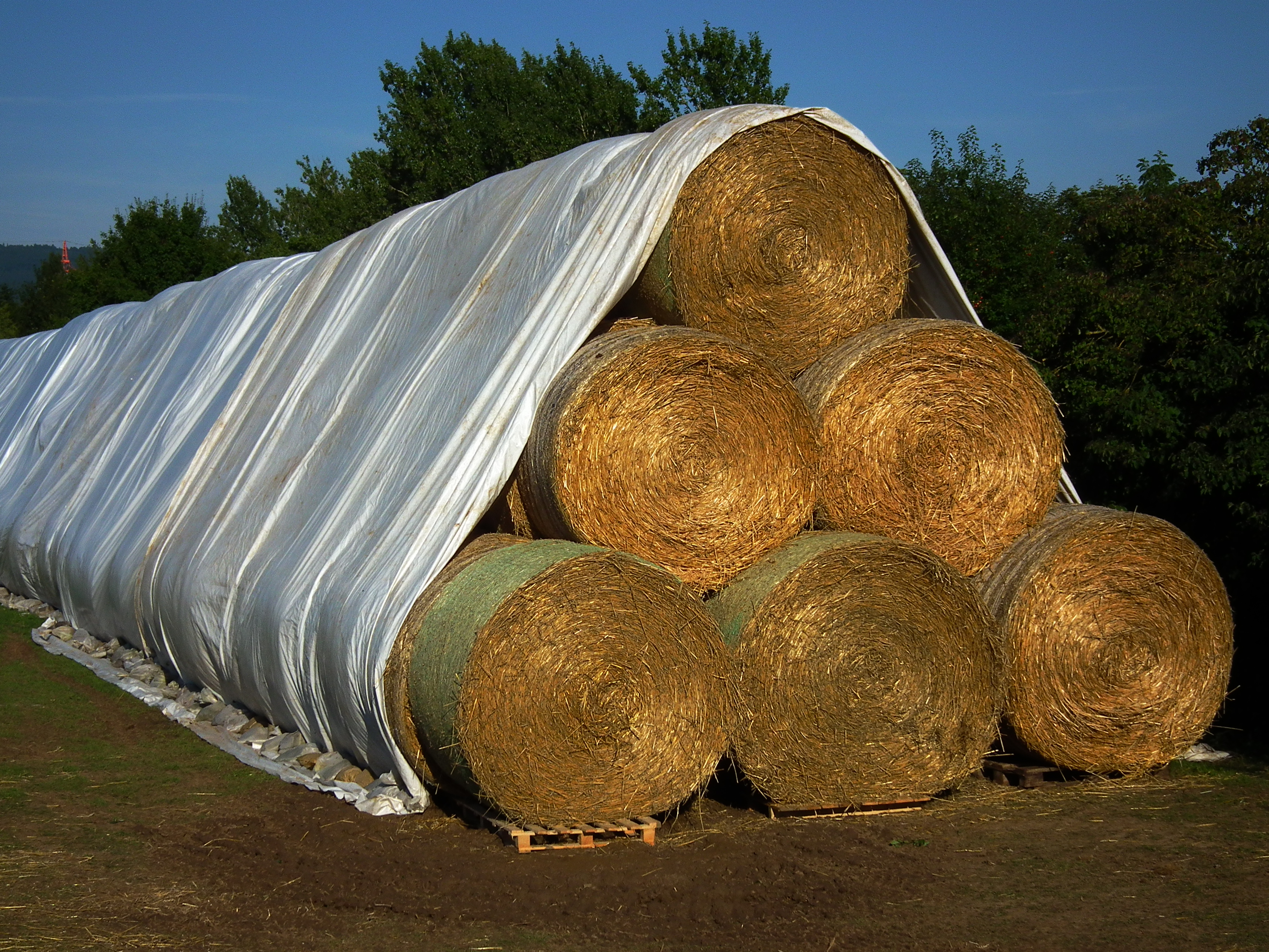 Lagerung runder Strohballen auf einer Koppel im nördlichen Baden-Württemberg, Deutschland)